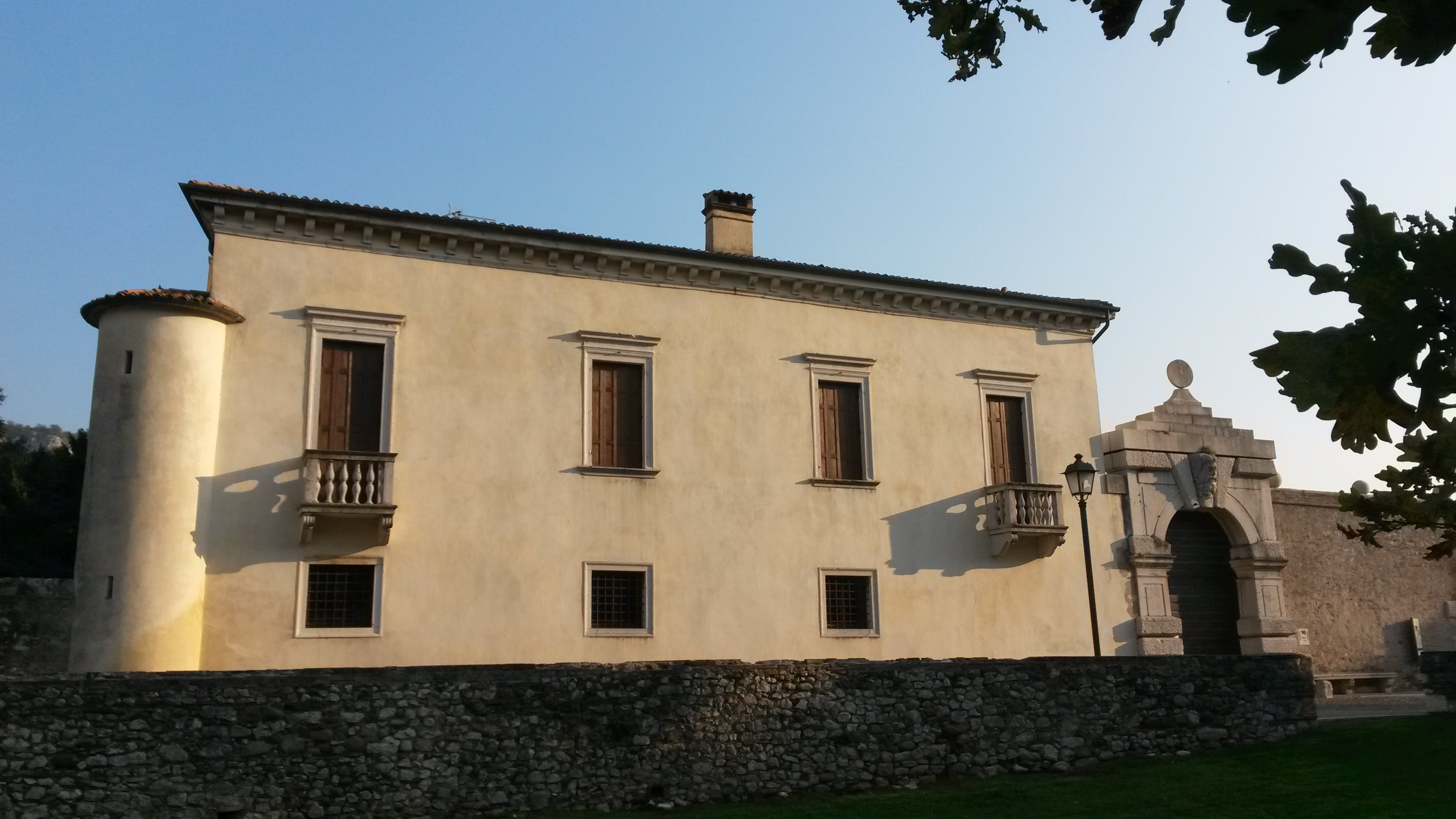 Facciata ovest.